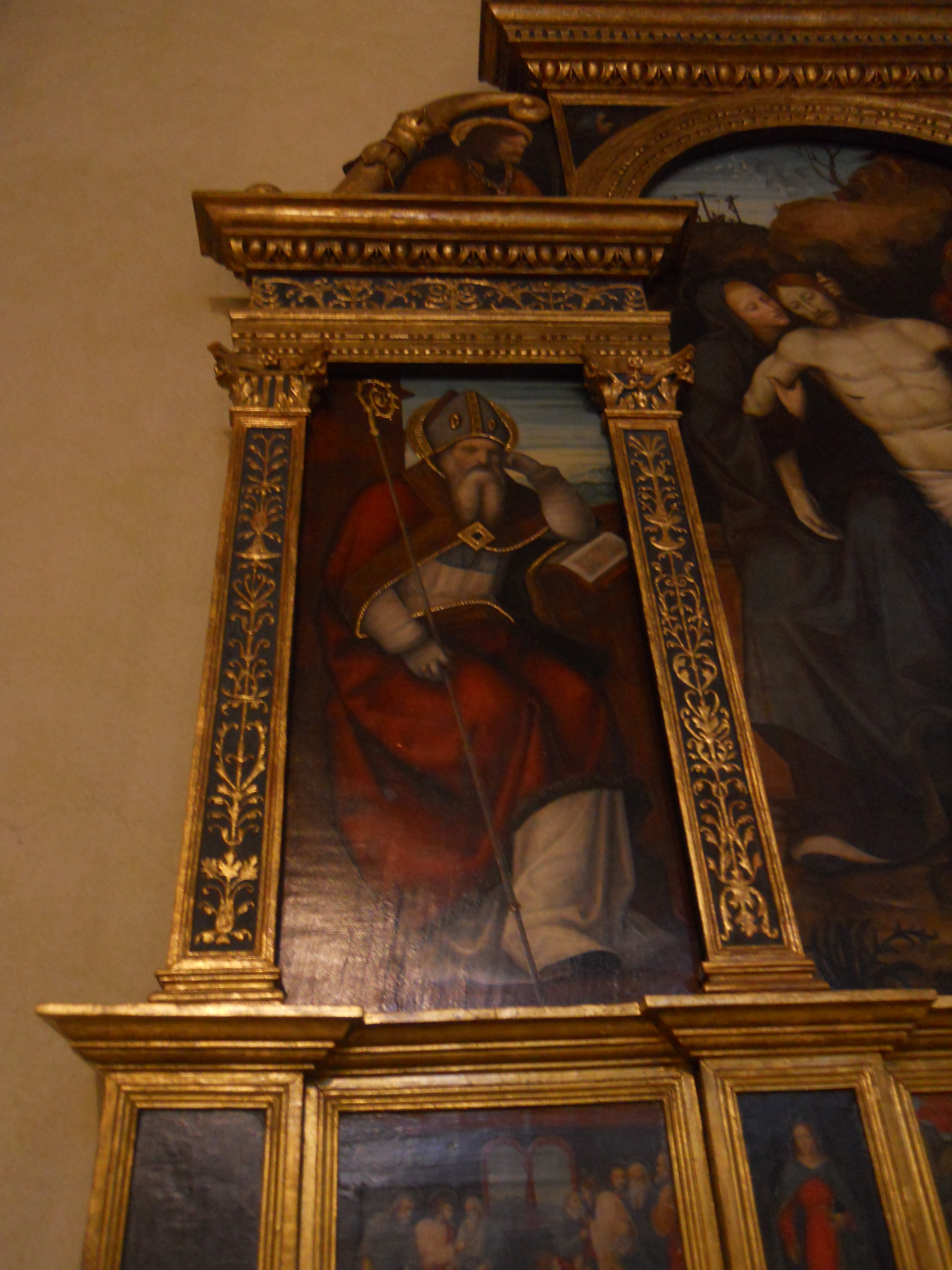 sant'angela merici (brescia) polittico2.jpg